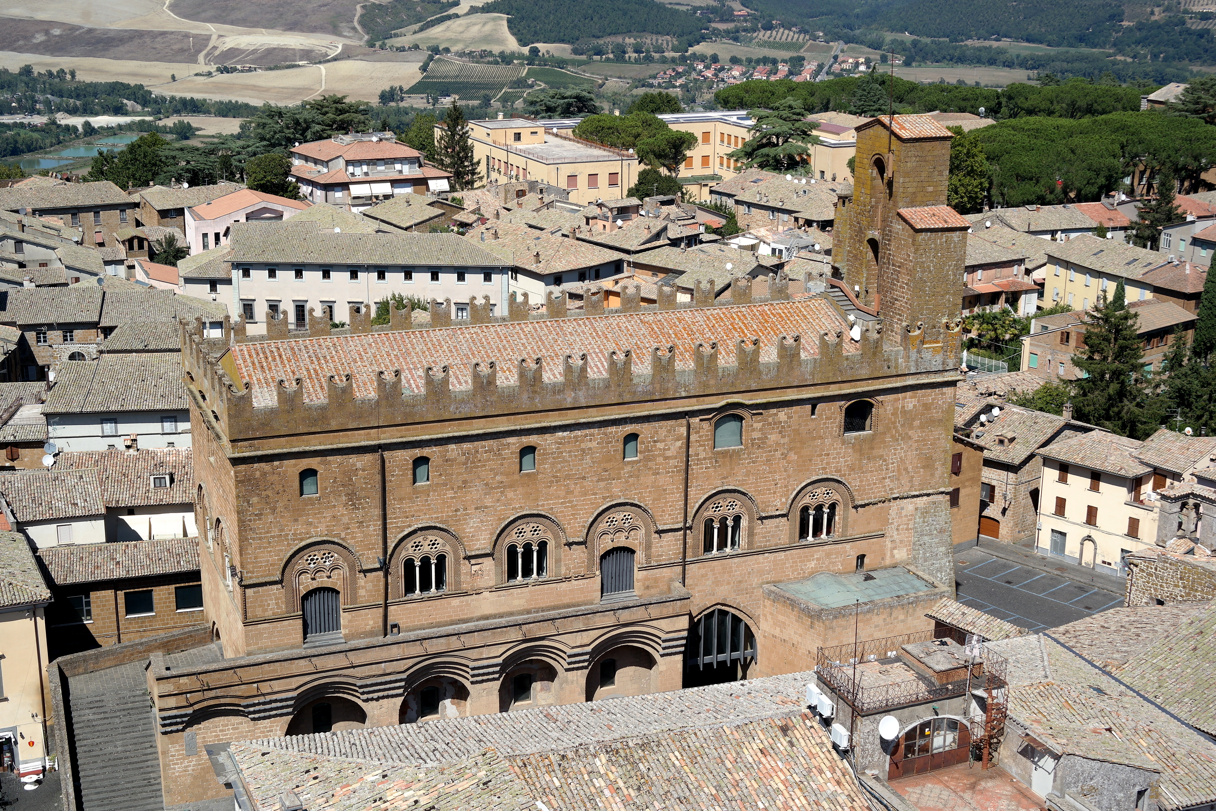 Veduta del Palazzo del capitano dalla Torre del Moro a Orvieto